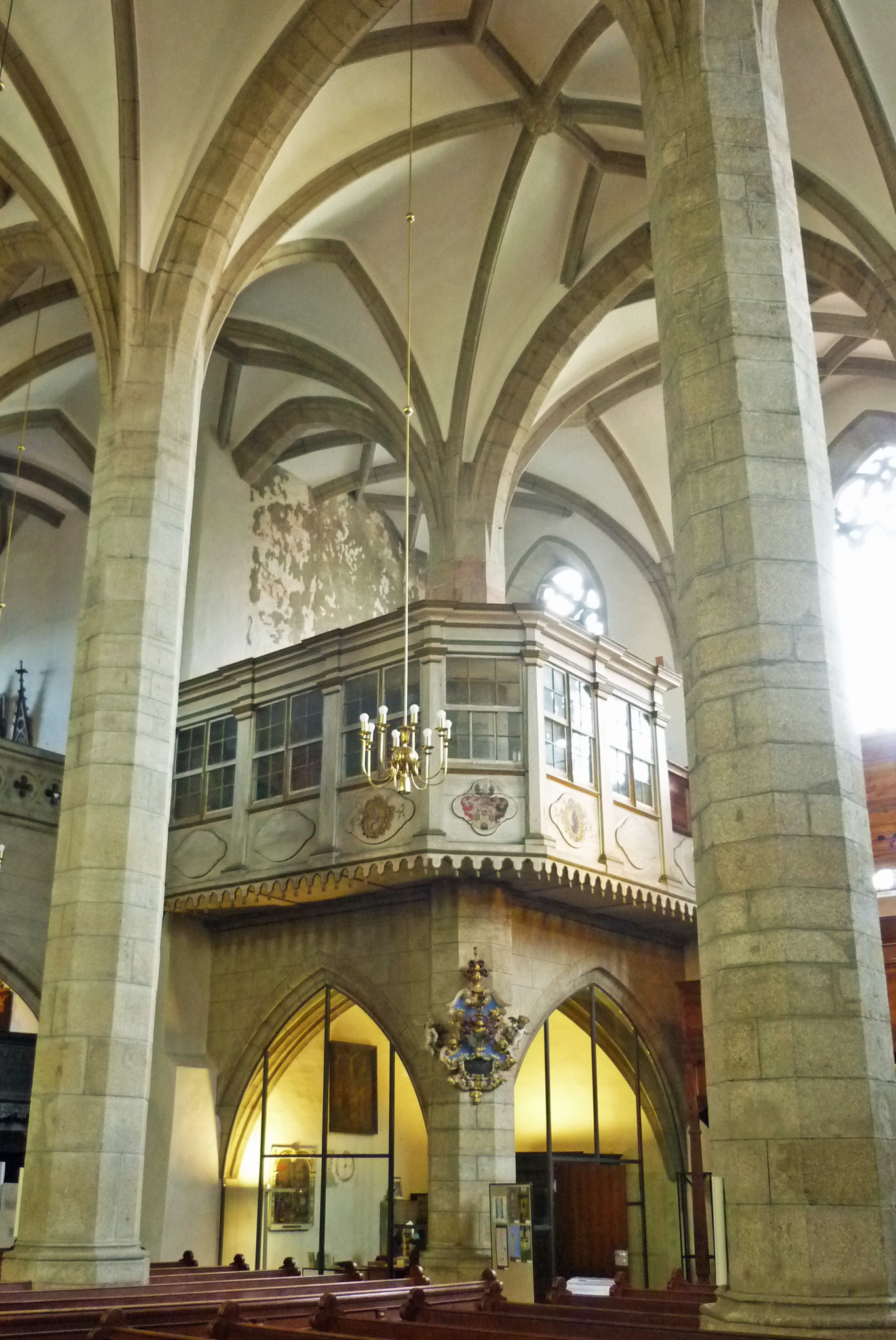 Kamenz, Marienkirche, Patronatsloge